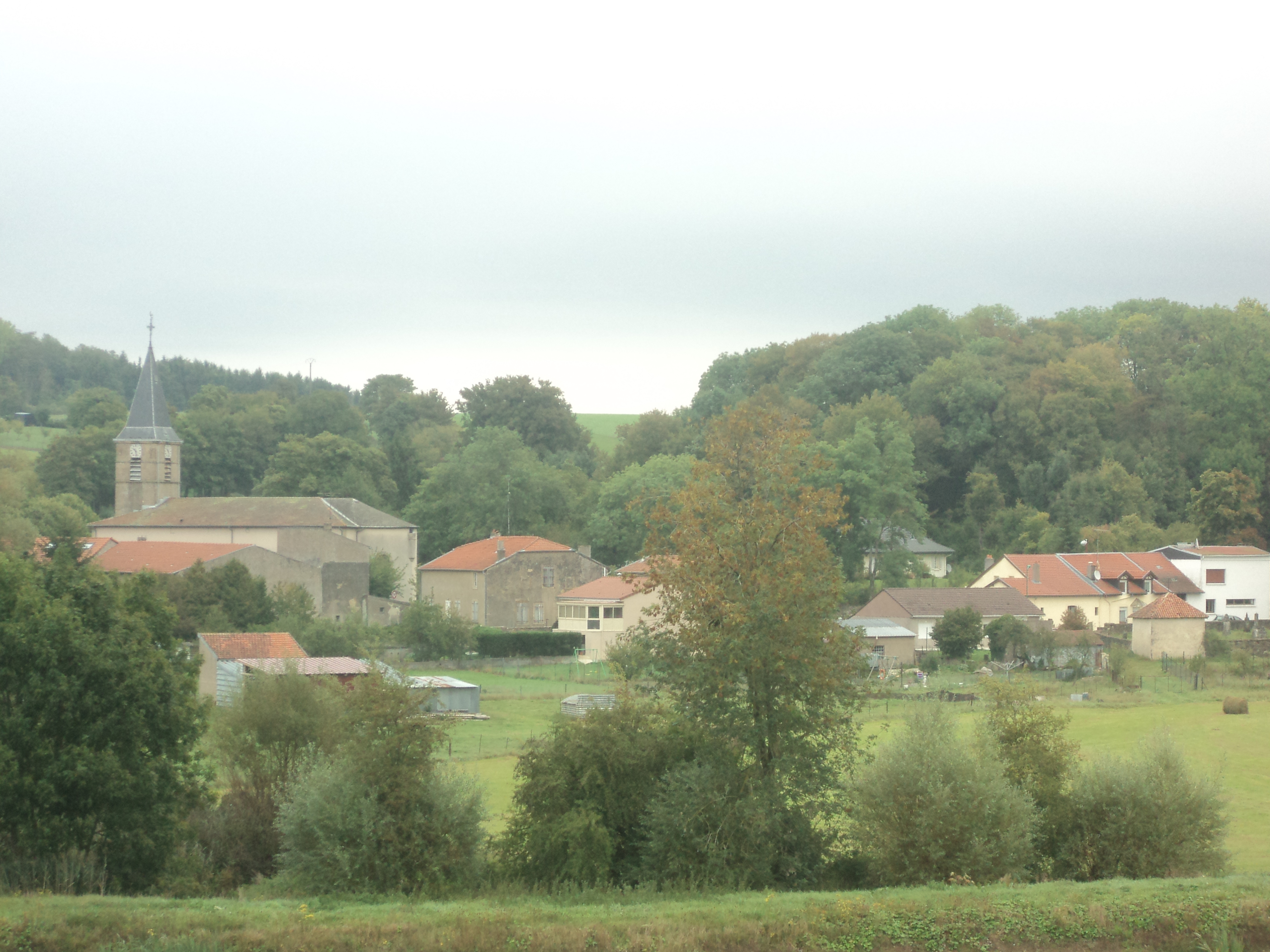 Vue de l'église de Tucquegnieux village